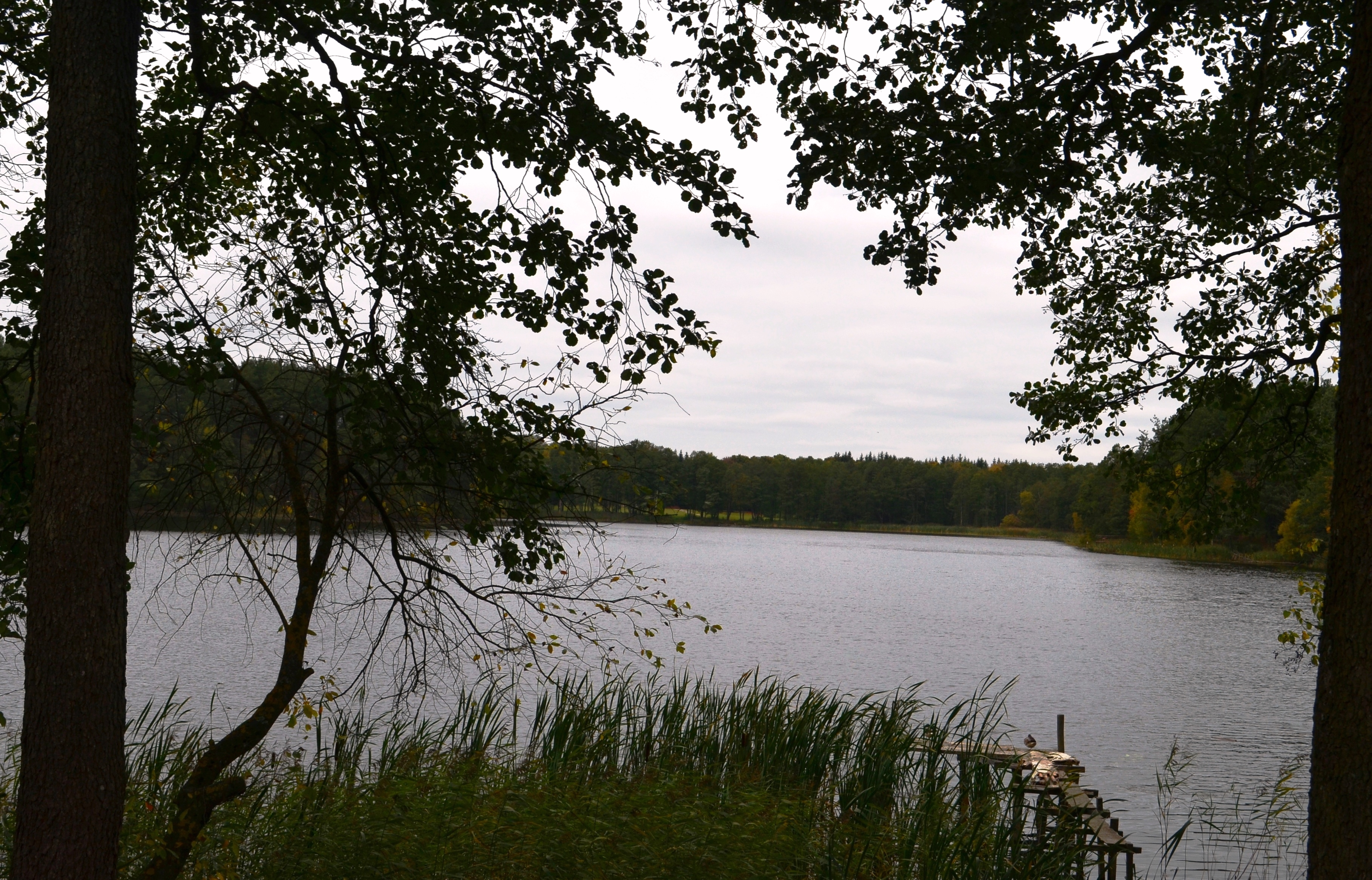 Ežeras Gavaitis, Ignalina